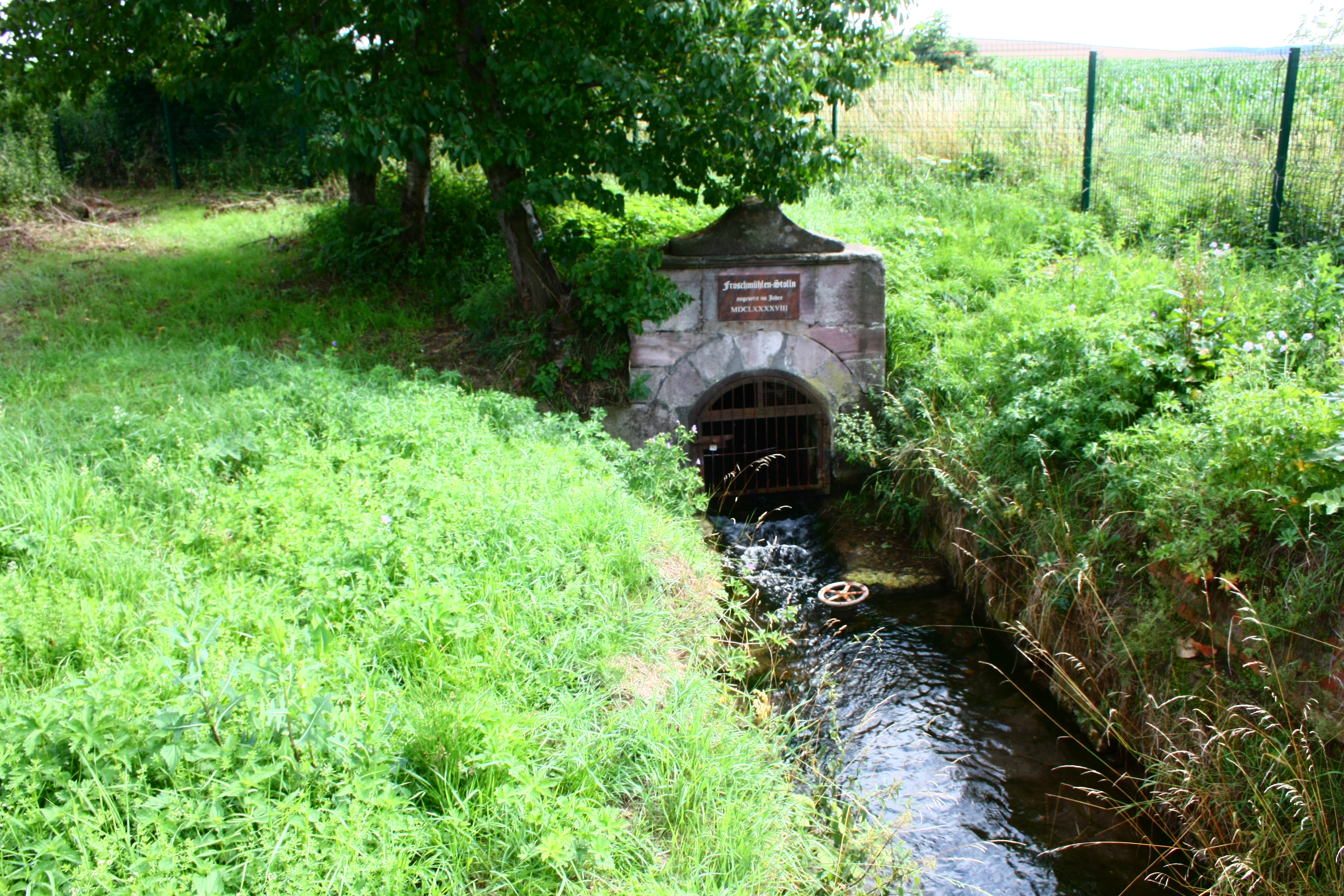 das Mundloch des Froschmühlenstollens bei Lüttchendorf